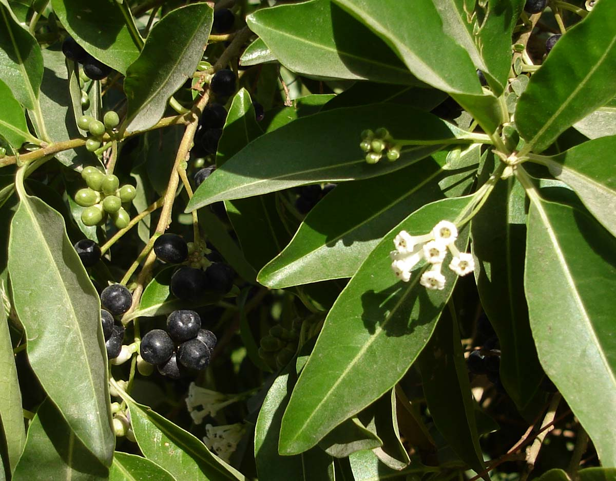 Cestrum diurnum, (vaitohi) in a Tongan garden